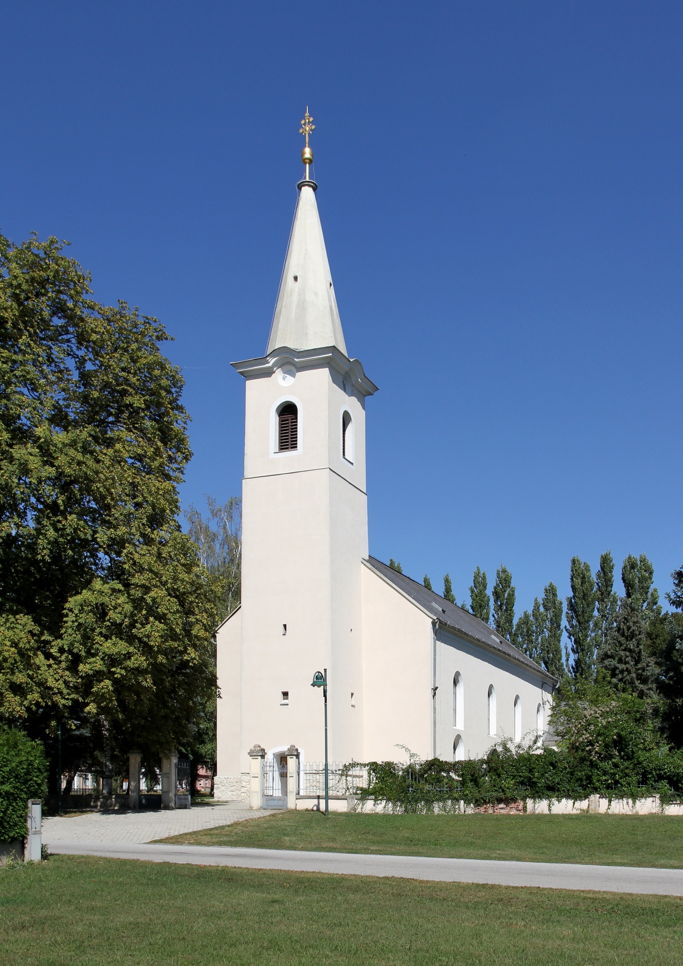 Katholische Pfarrkirche hl. Anna in Kleinwarasdorf, ein Ortsteil der burgenländischen Gemeinde Großwarasdorf. Eine einschiffige Saalkirche mit vorgestelltem Turm, die laut Inschrift 1505 errichtet, 1860 erweitert und geweiht wurde.